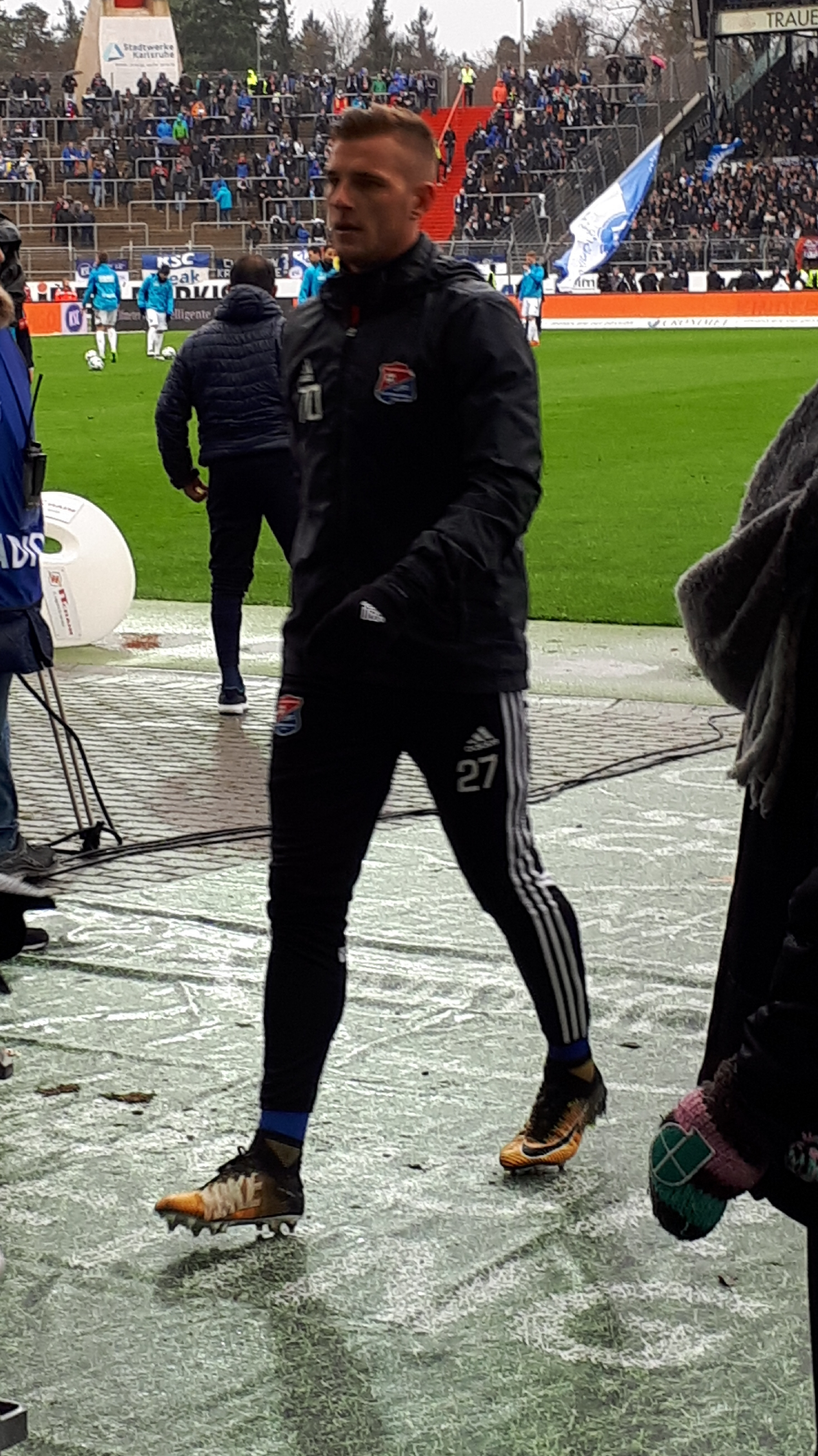 Fußballspieler Vitalij Lux beim Heimspiel des Karlsruher SC gegen die SpVgg Unterhaching am 20. Januar 2018.